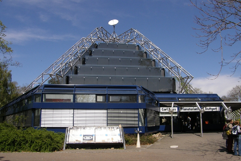 Das Gebäude des Carl Zeiss Planetariums in Stuttgart.